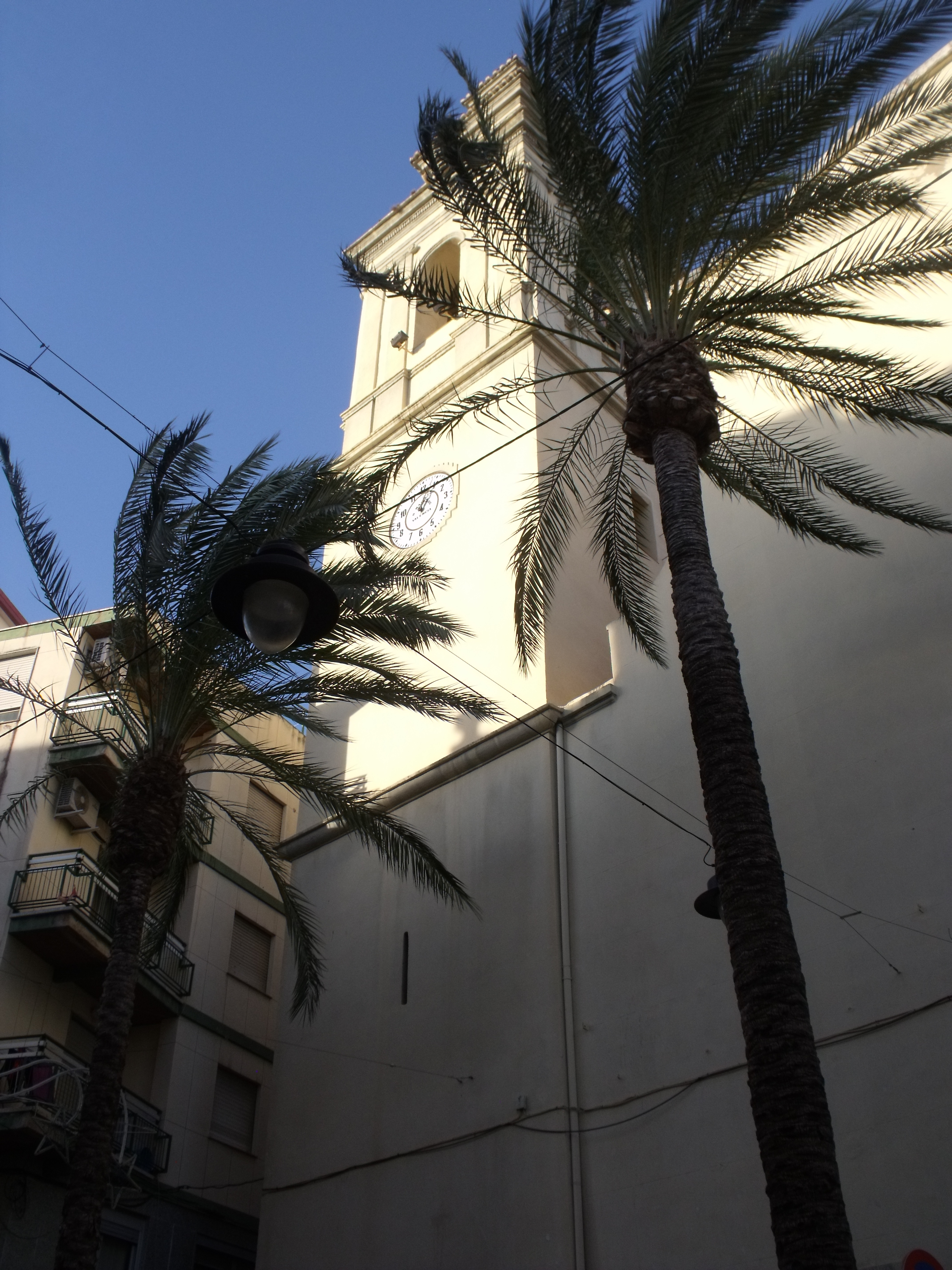 Campanario de San Pedro